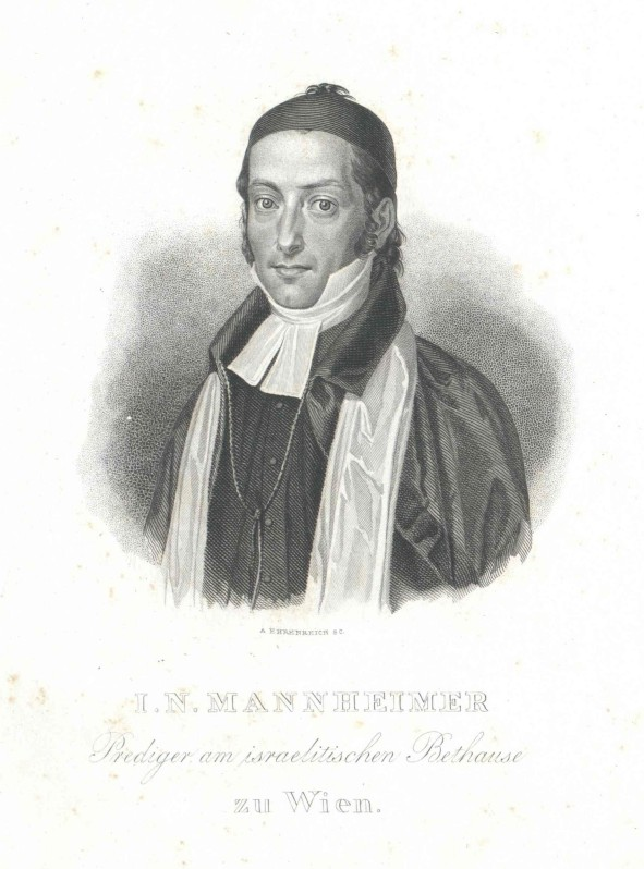 Isaak Noah Mannheimer